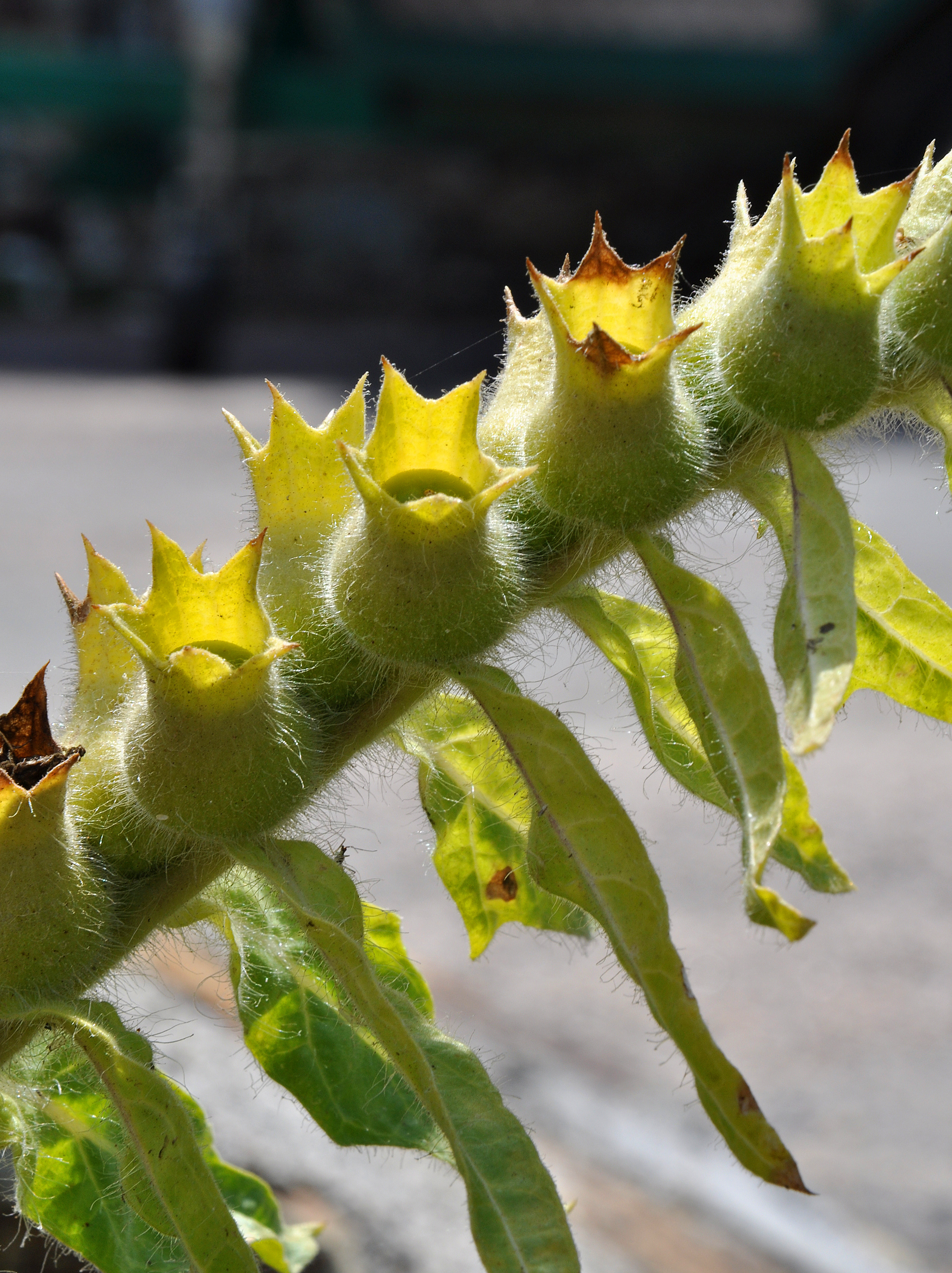 Hyoscyamus niger